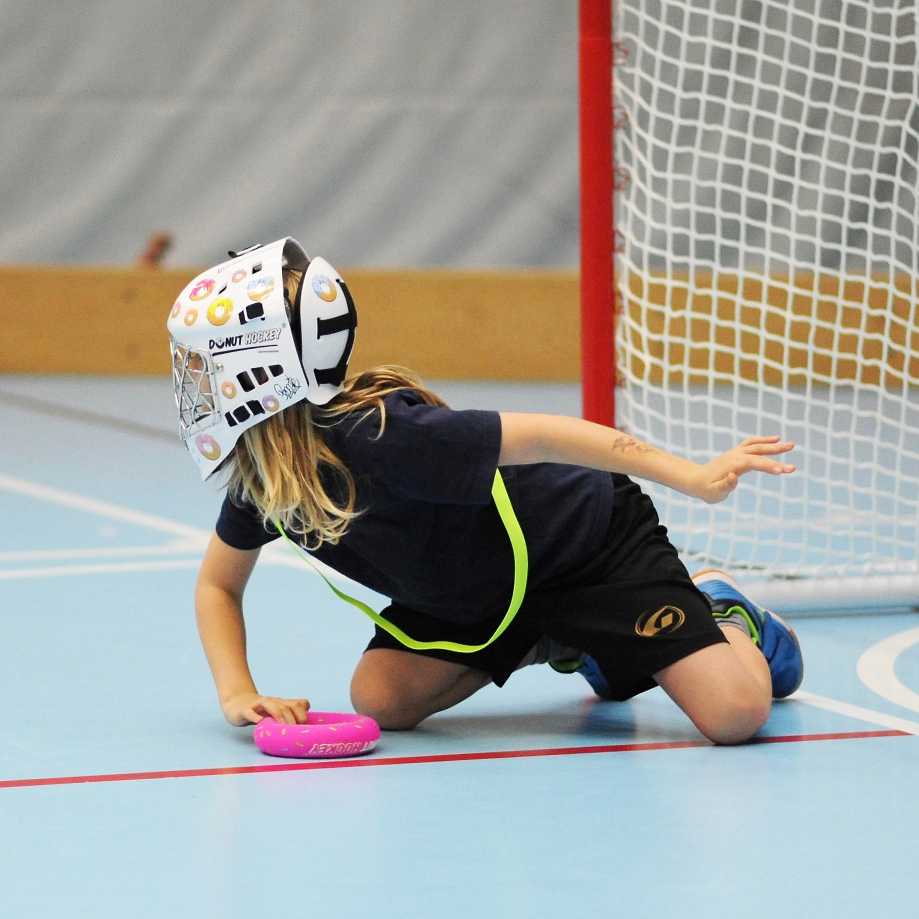 Donut Hockey-Torhüter mit Maske und Donut